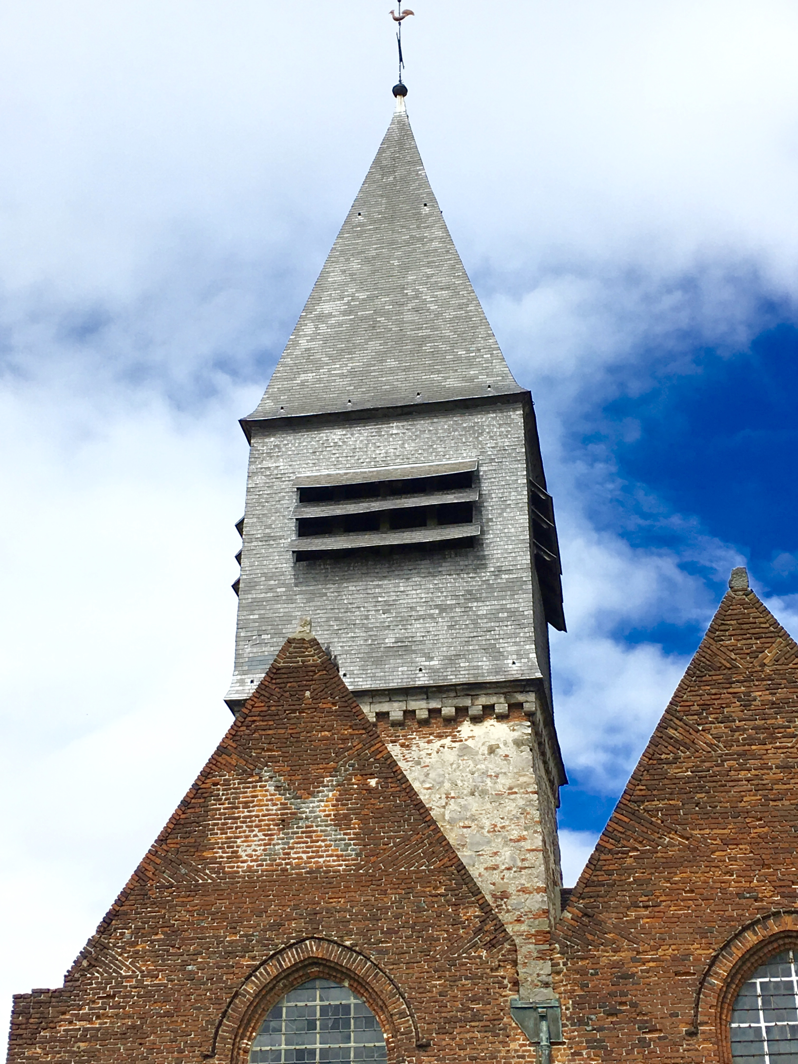 Clocher de l'église Saint-Michel